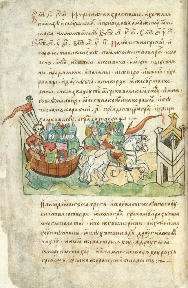 Радзивилловская (Кёнигсбергская) летопись.